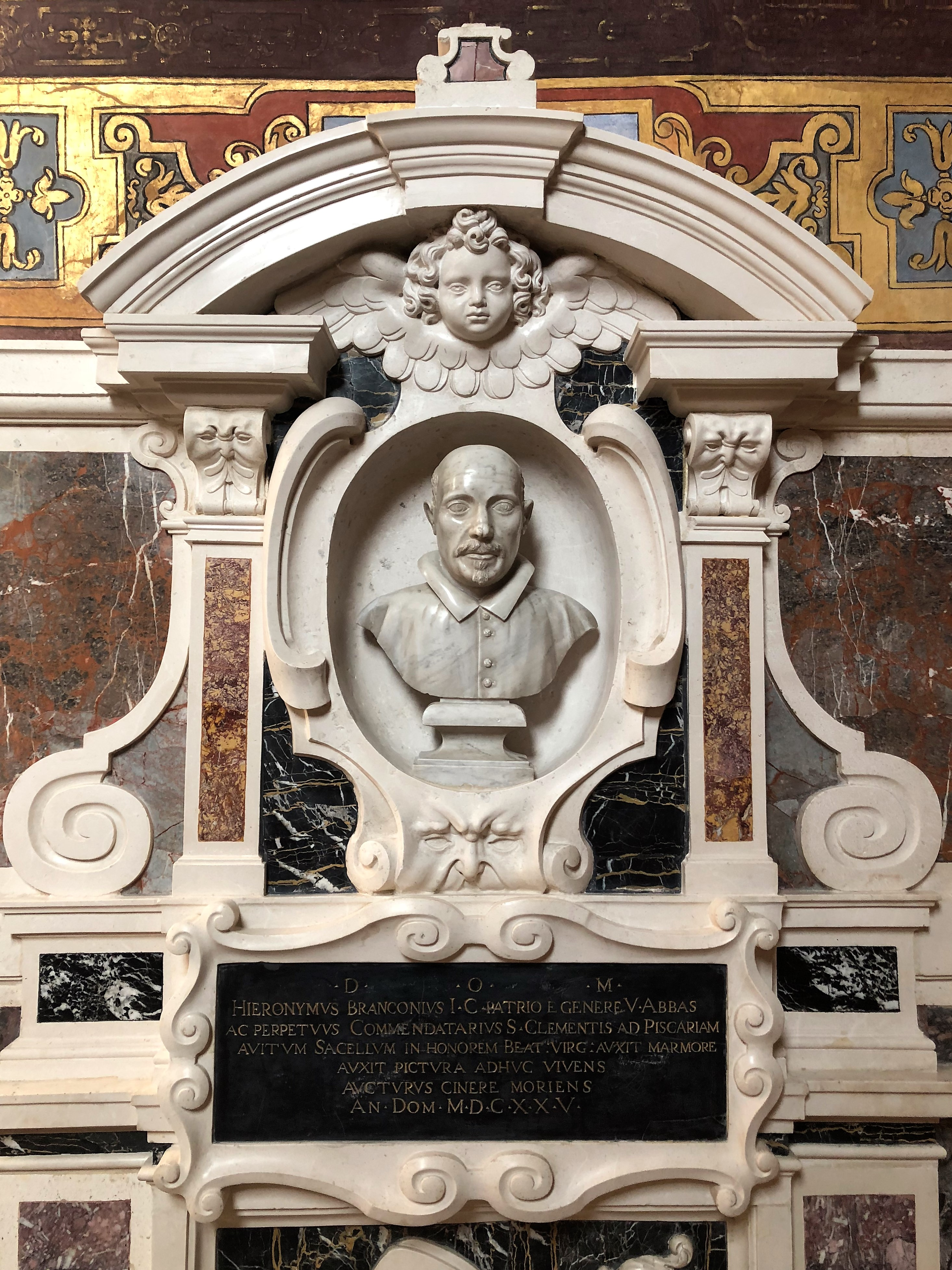 Busto di Girolamo Branconio nella cappella Branconio della chiesa di San Silvestro in L'Aquila.